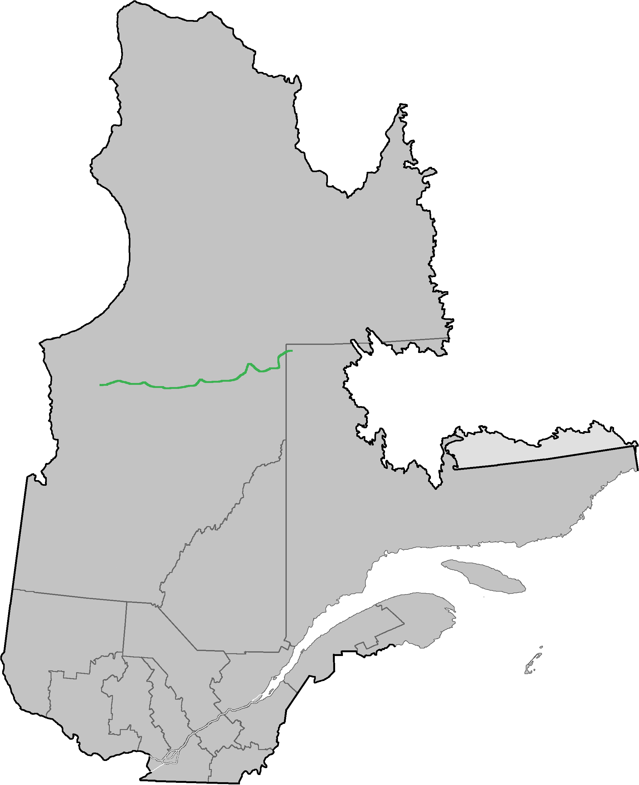 Carte de la route québécoise au Nord-du-Québéc